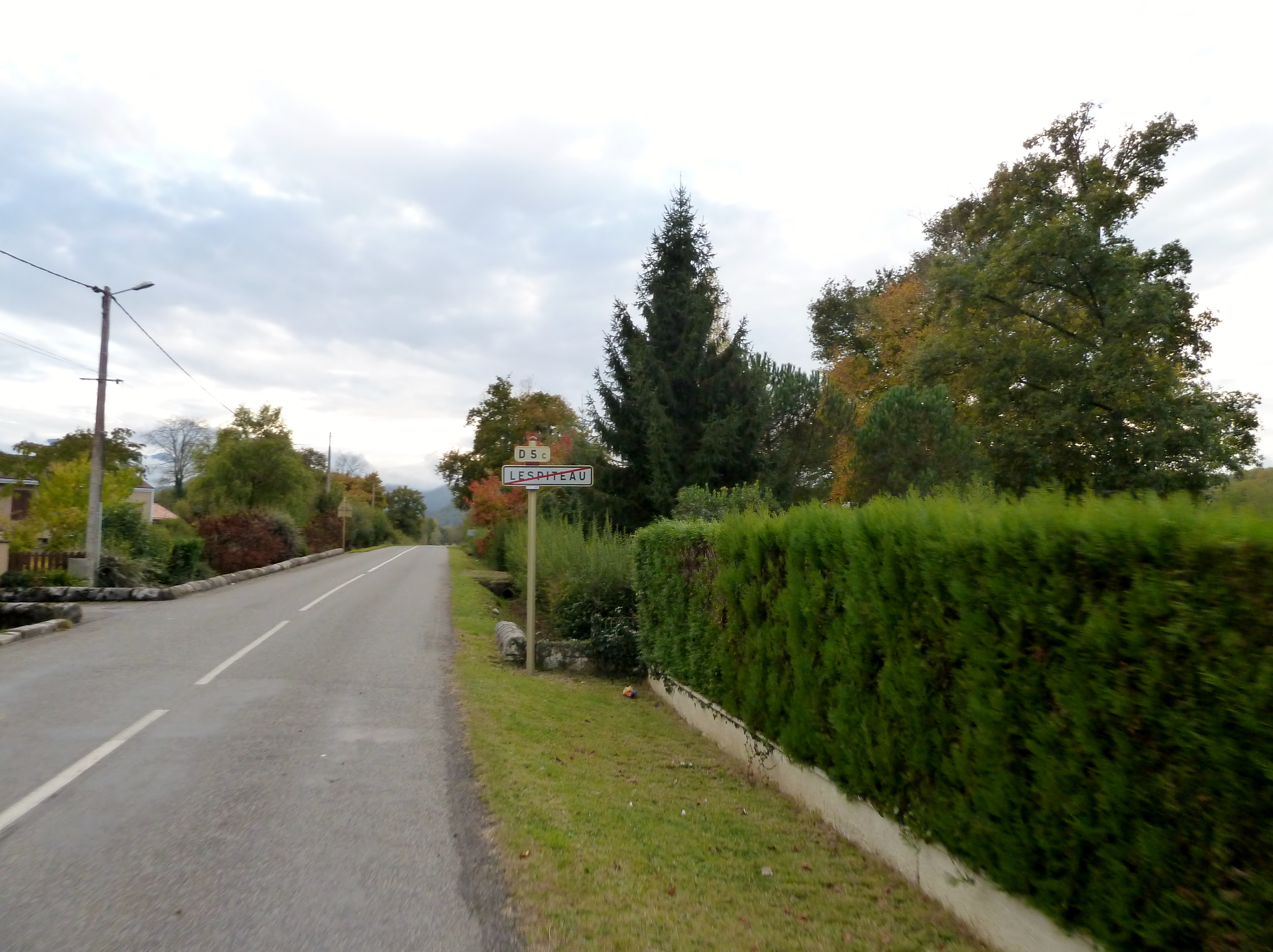 Sortie de Lespiteau